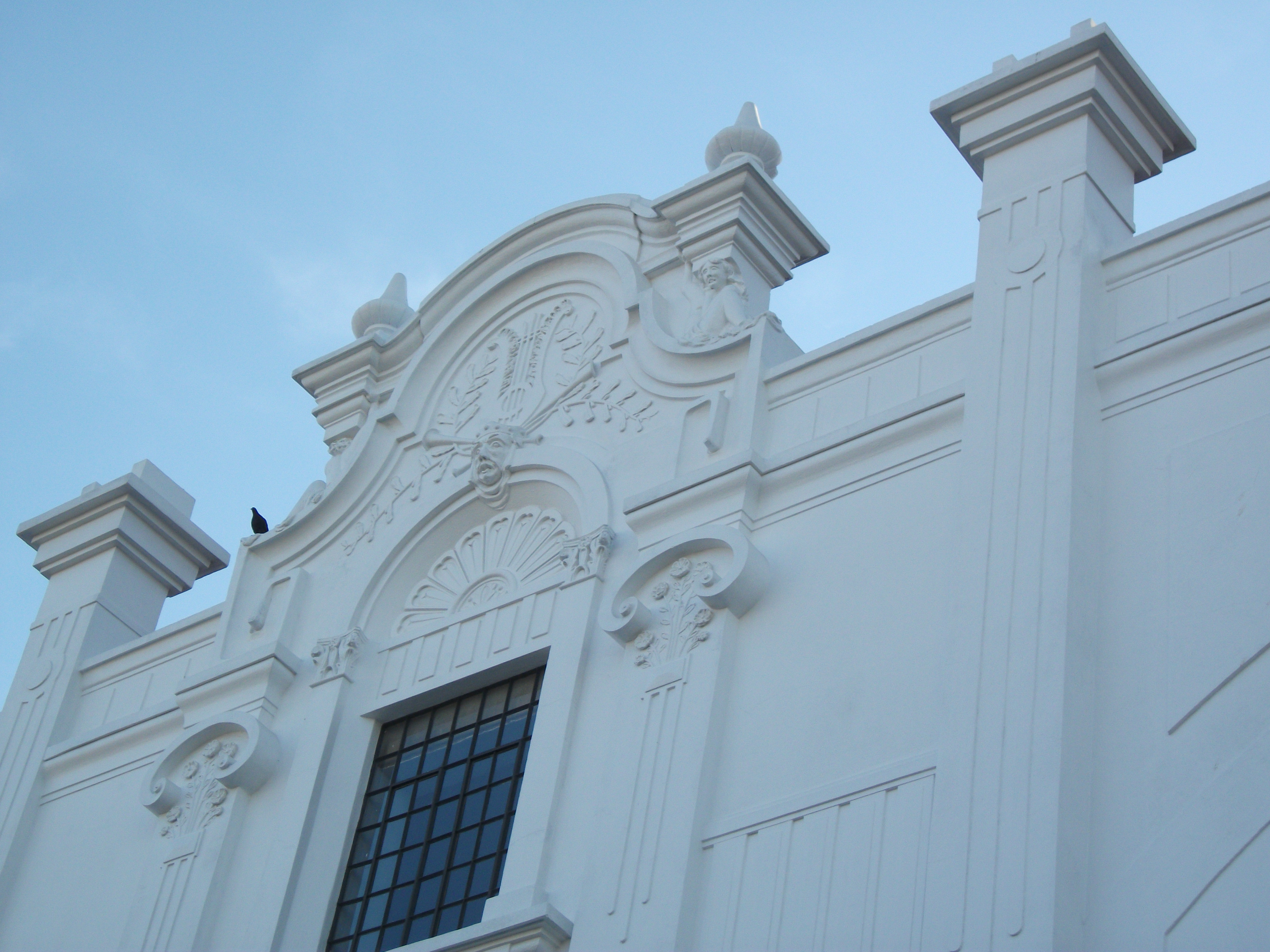 Fachada do Teatro Polytheama.